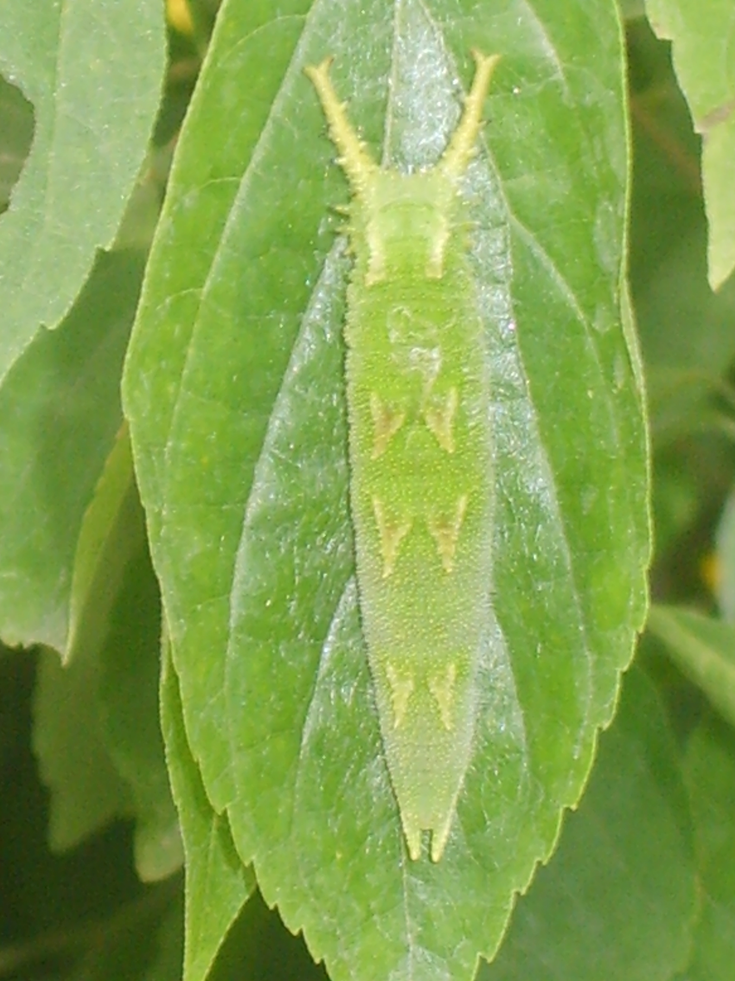 Sasakia charonda larva. Hampyung Korea 위에서 본 왕오색나비 애벌레. 함평 나비축제 국제나비관에서 찍음.